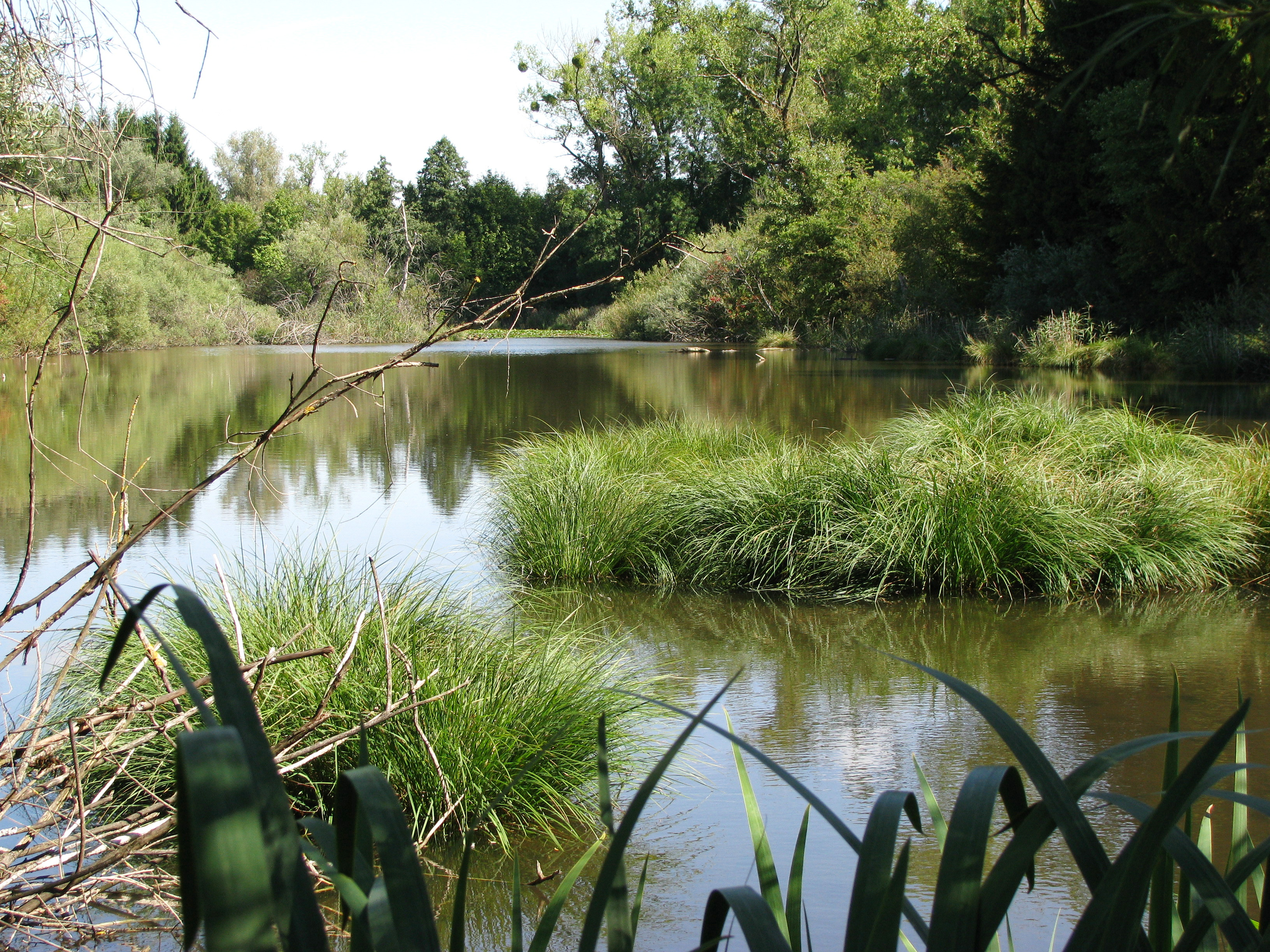 Weiher bei der Moosschwaige, in nordöstliche Richtung gesehen.